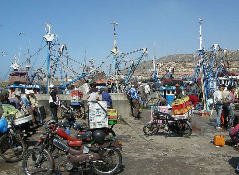 Port de pêche, Agadir, Maroc. Mars 2012.